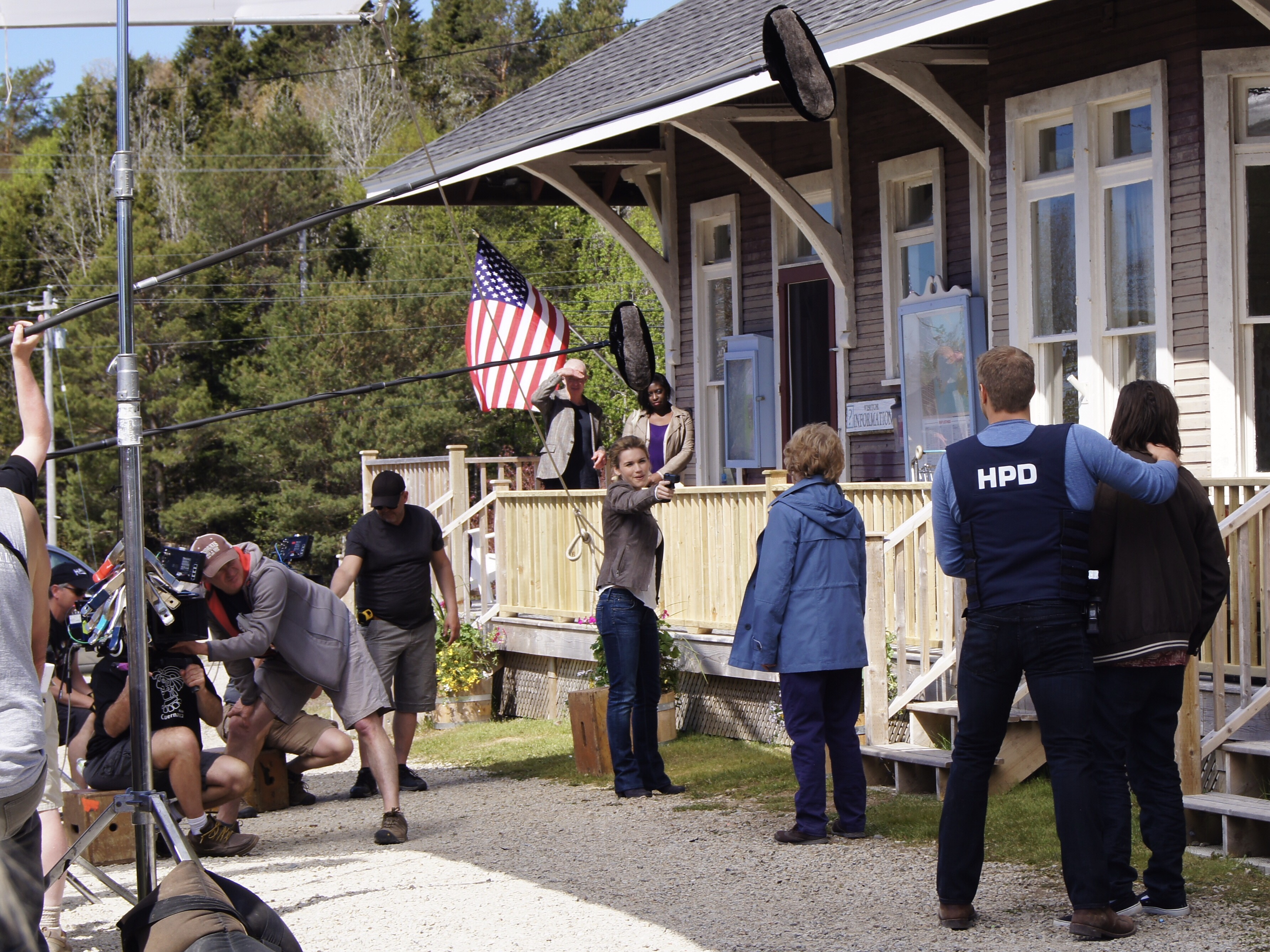 Dreharbeiten Haven in Chester (NS)